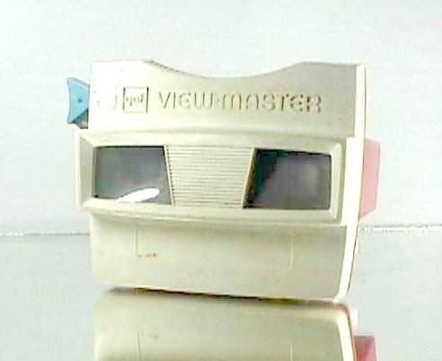 View Maste Model G White & Red